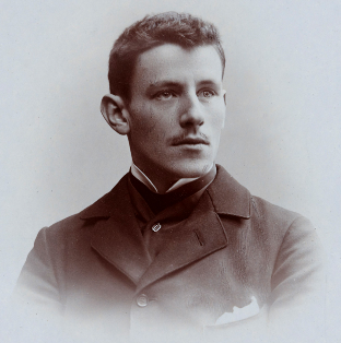 Carl Albert Loosli um 1898. Porträtfotografie aus dem Atelier von Hermann Völlger an der Berner Marktgasse (Carl-Albert-Loosli-Gesellschaft)